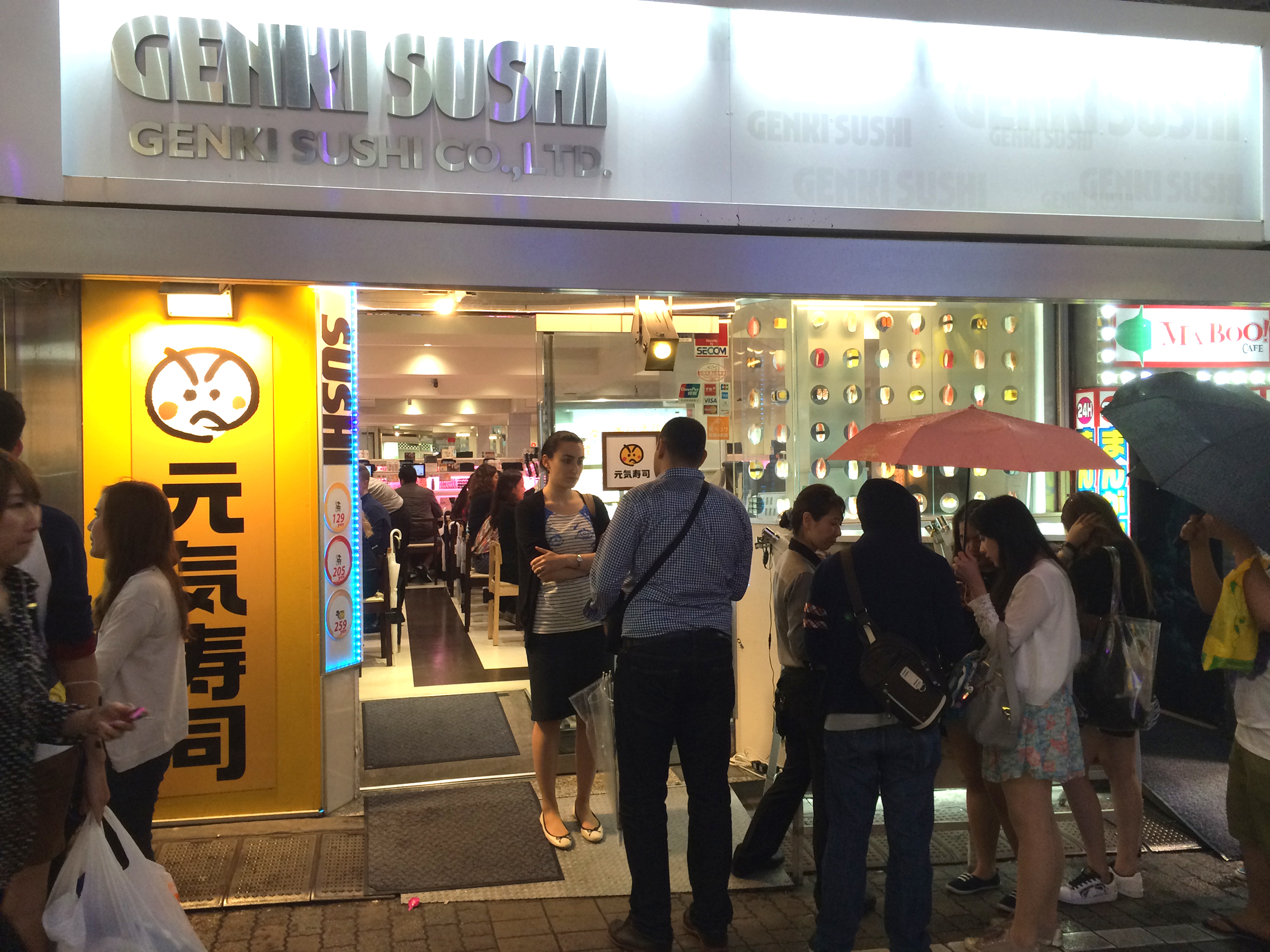 Genki Sushi in Shibuya